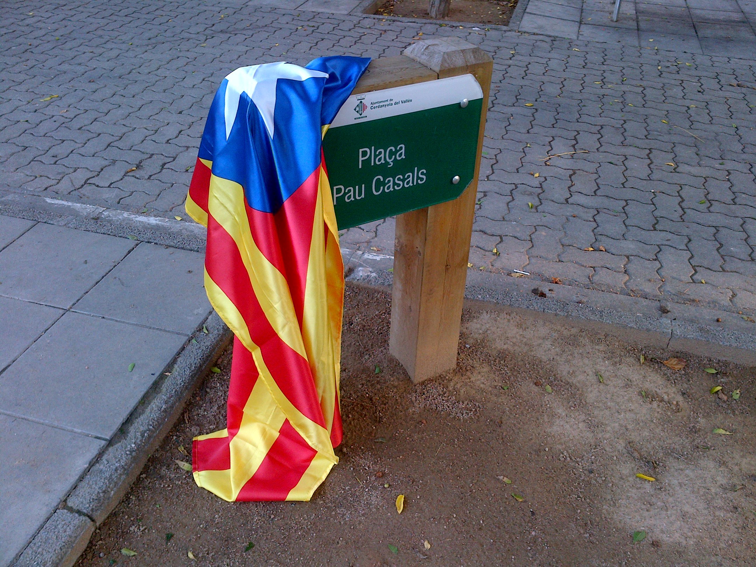 Estelada a la Plaça Pau Casals de Cerdanyola Serraparera